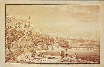 Die Wohnung der Ainus am nördlichen Ende von Matsmai, der Pic de Langle im Hintergrunde